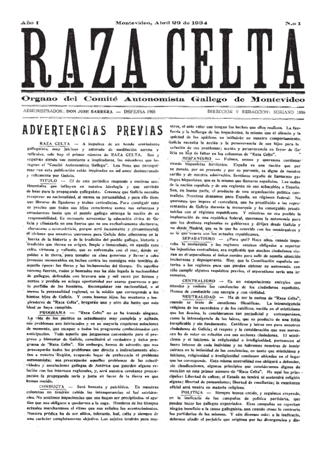 Raza Celta. Montevideo. N. 1